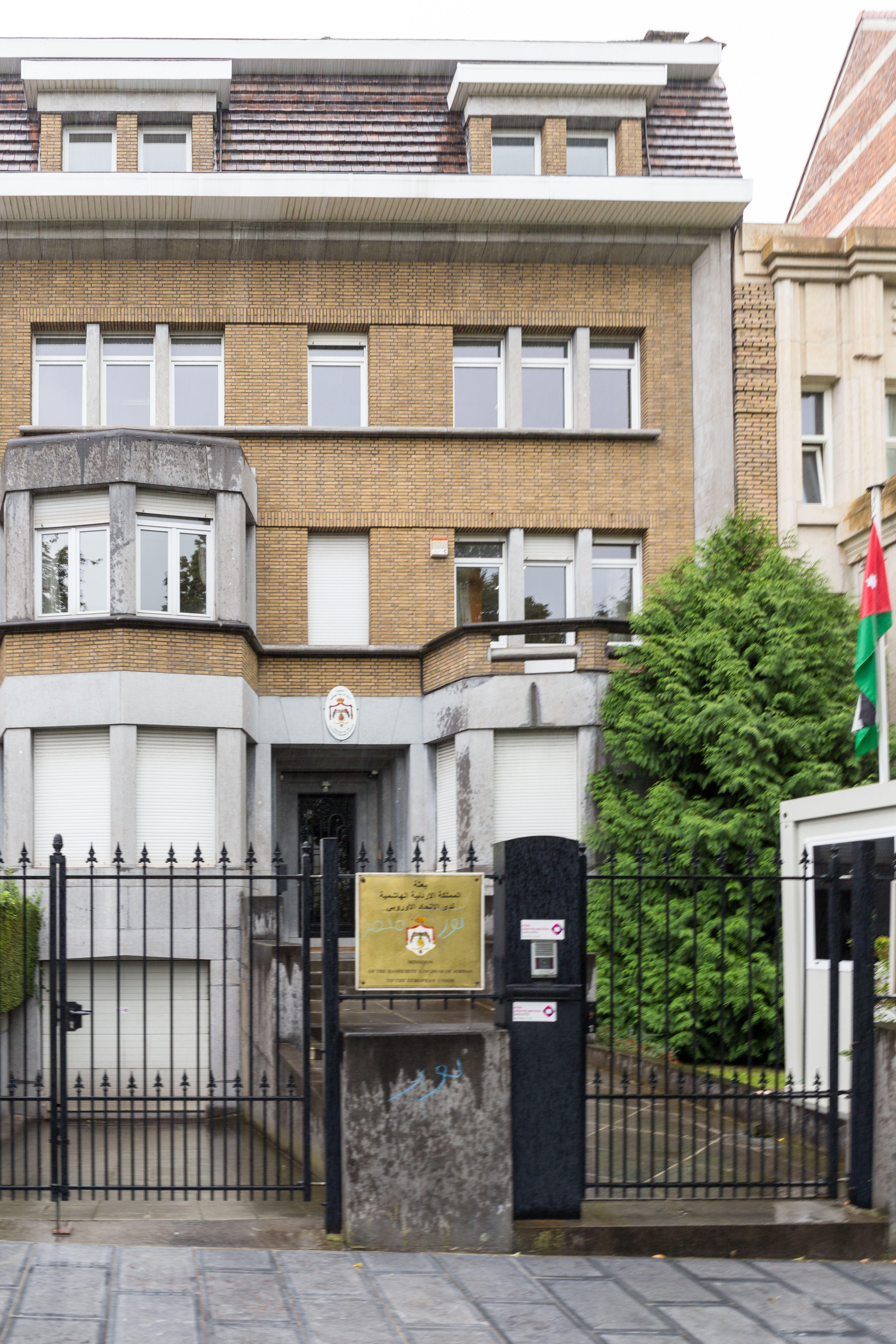 Ambassade de Jordanie en Belgique, avenue Franklin Roosevelt 104 à Bruxelles.